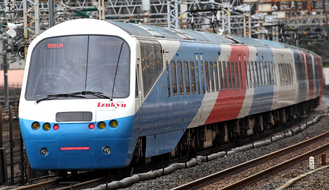 Izu Kyūkō 2100 series EMU Alpha Resort 21 ( R-5F ).